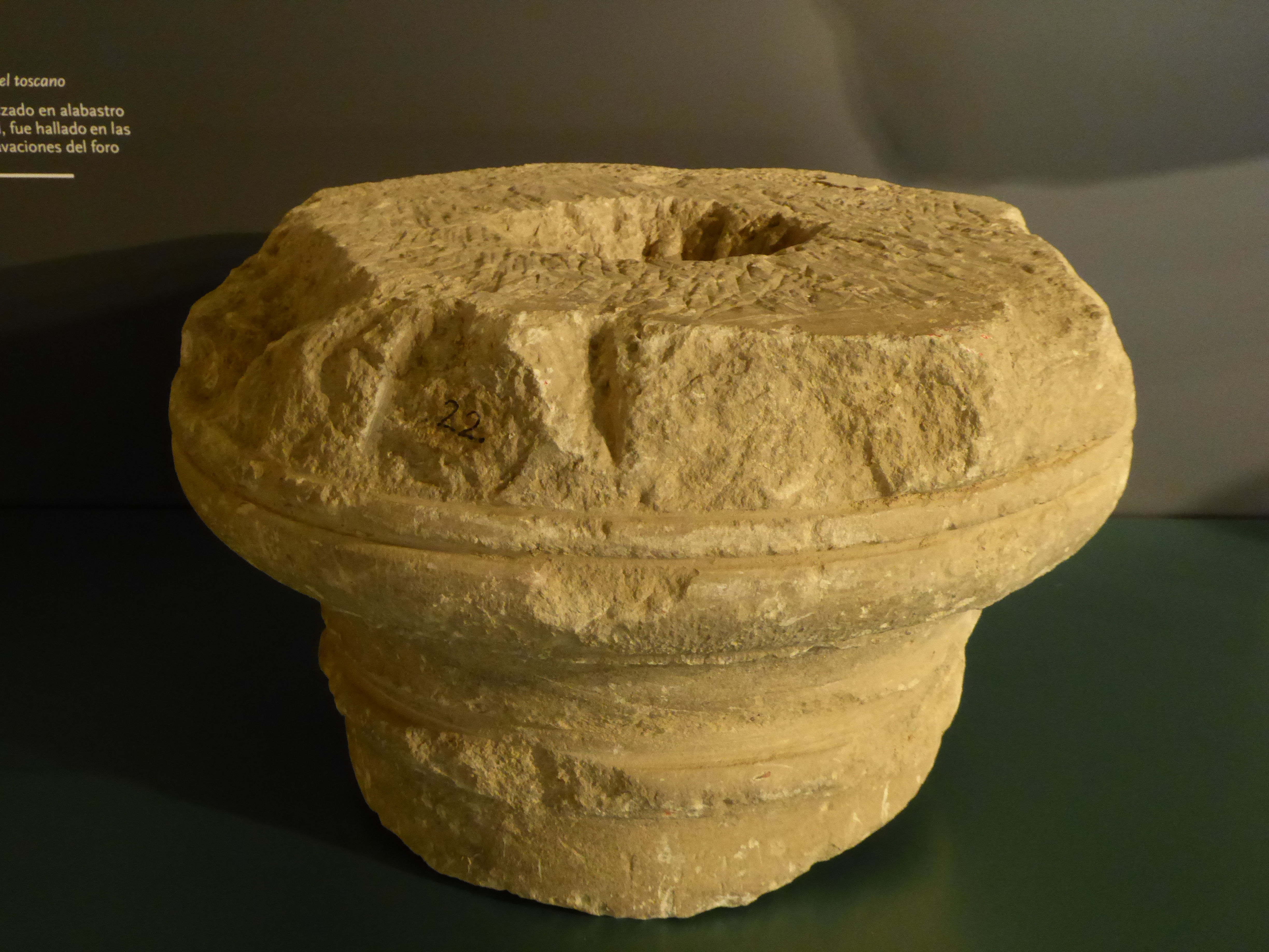 Capitel toscano en alabastro local.